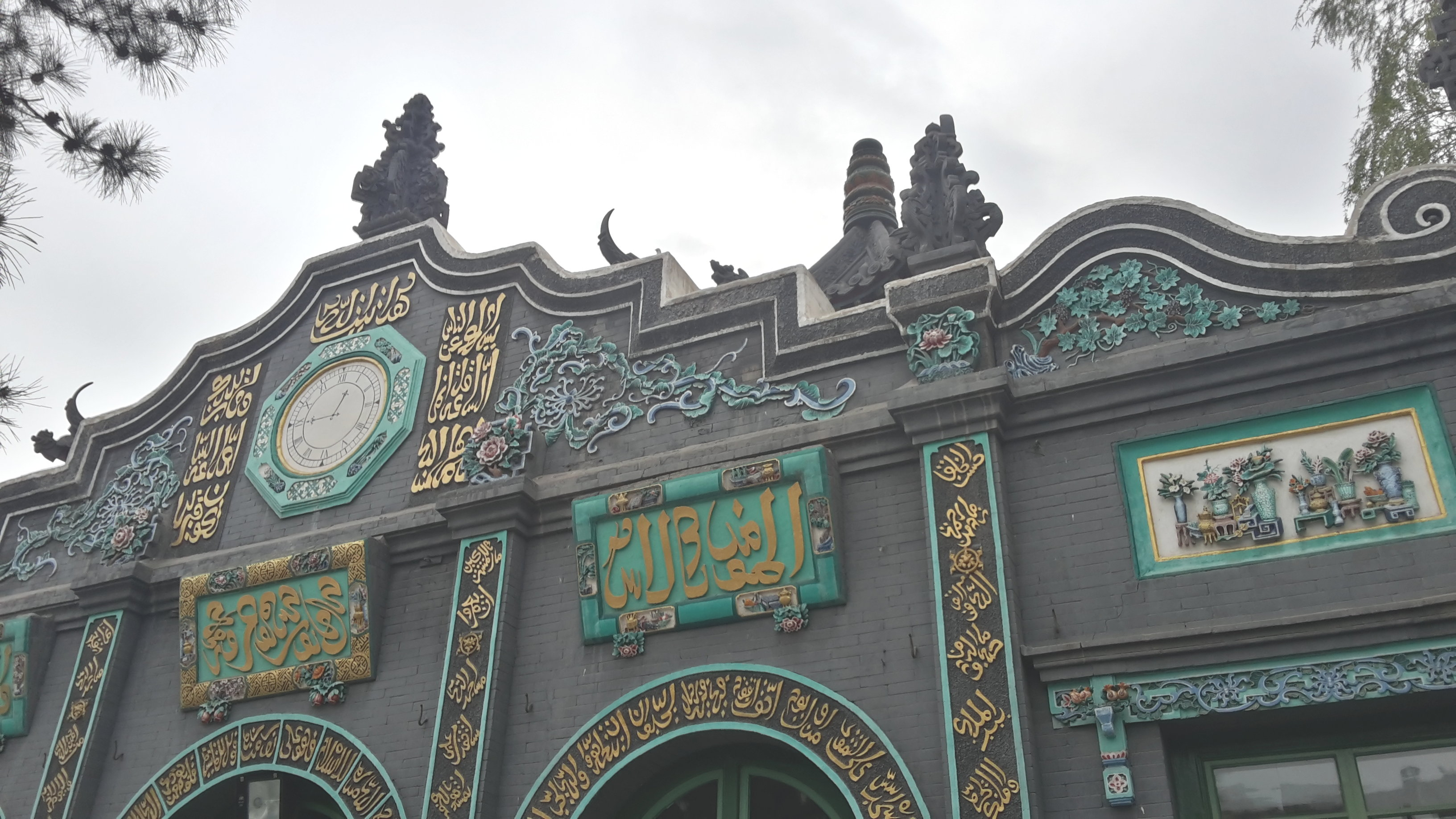 Façade intérieure comportant une horloge de la Grande mosquée de Hohhot, capitale de Mongolie-Intérieure, en République populaire de Chine.